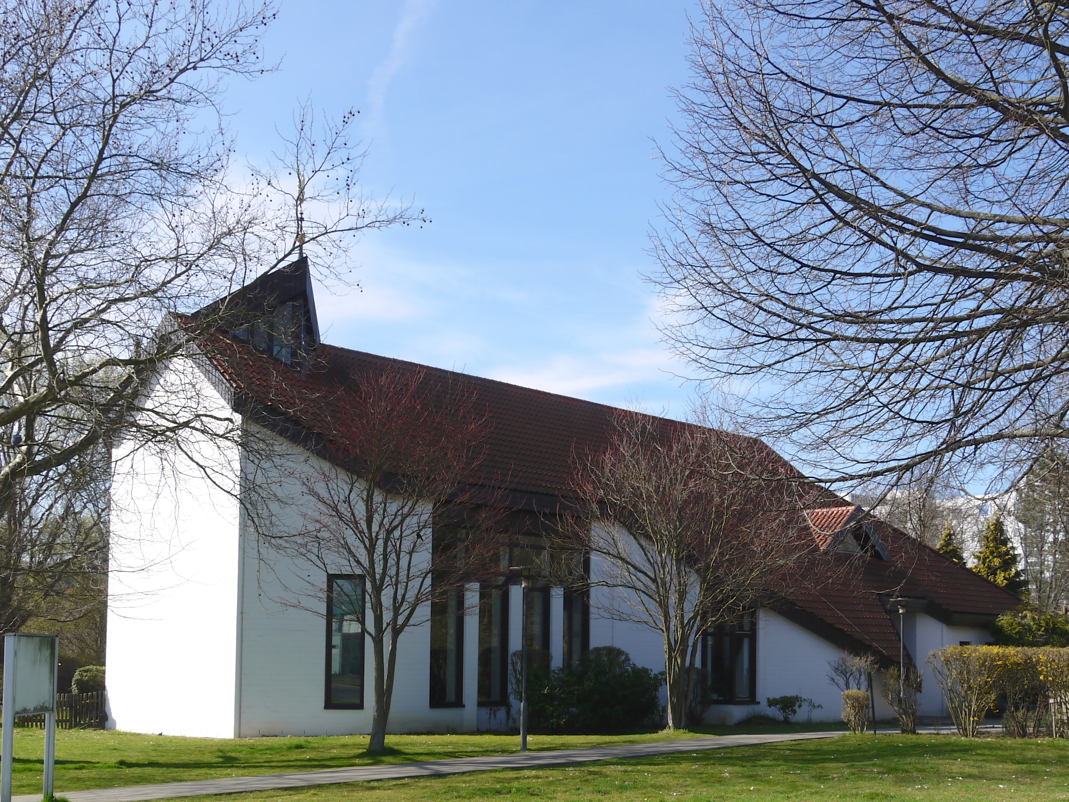 Evangelisch-lutherische Friedenskirche in Salzgitter-Fredenberg